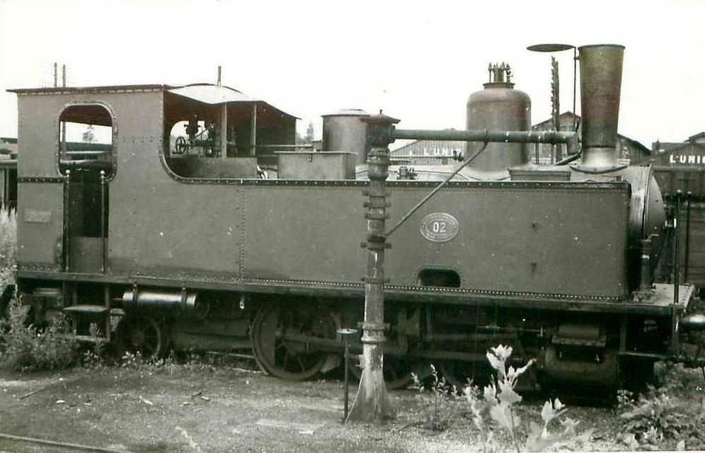 Locomotive Corpet-Louvet 031T n° 02 du tramway de Meaux à Dammartin en gare de Meaux-Transit.